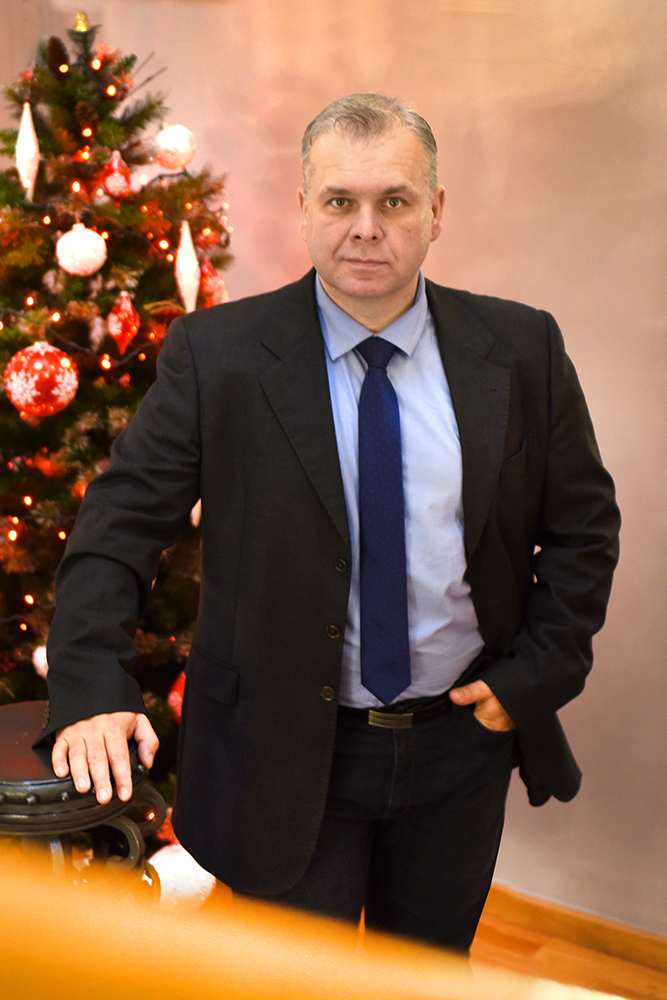 Dyrektor MDK w Częstochowie Paweł Musiał